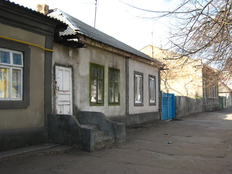 Бывший дом кооператива "Объединение"